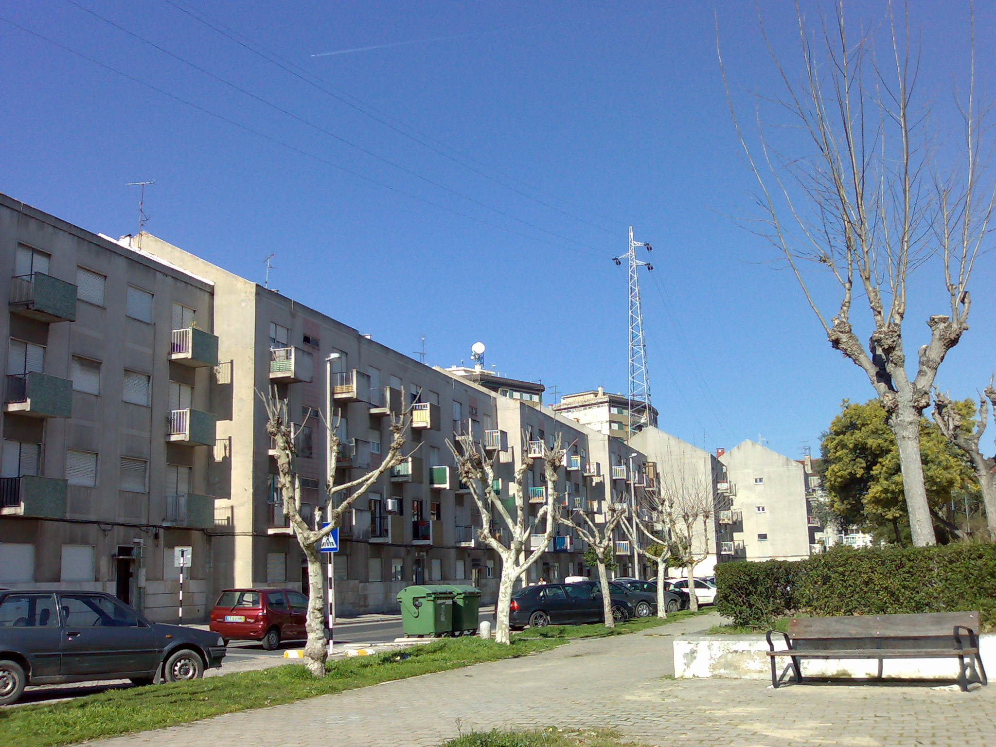 Uma rua da cidade do Barreiro, em Portugal.